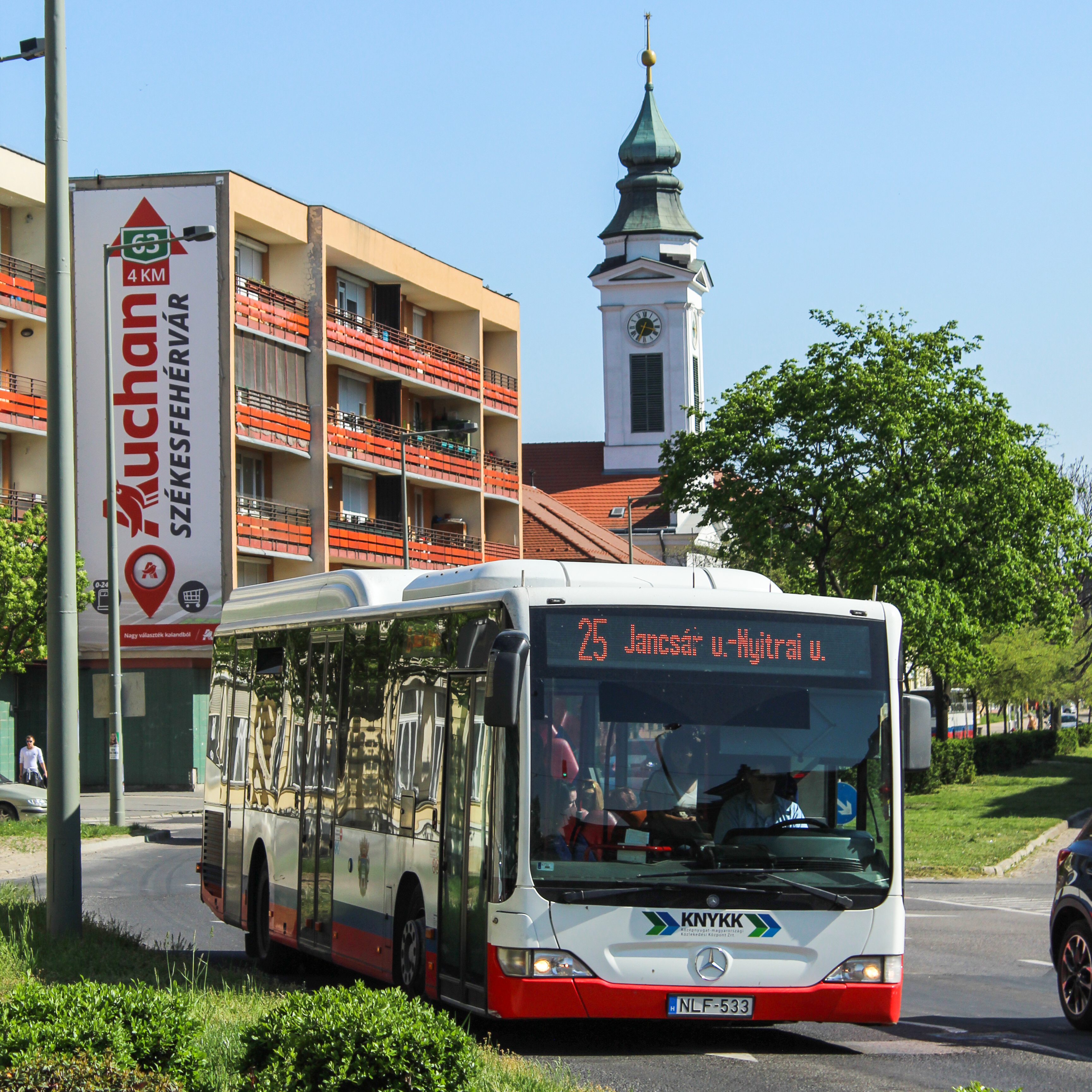 Székesfehérvár, Széchenyi utca